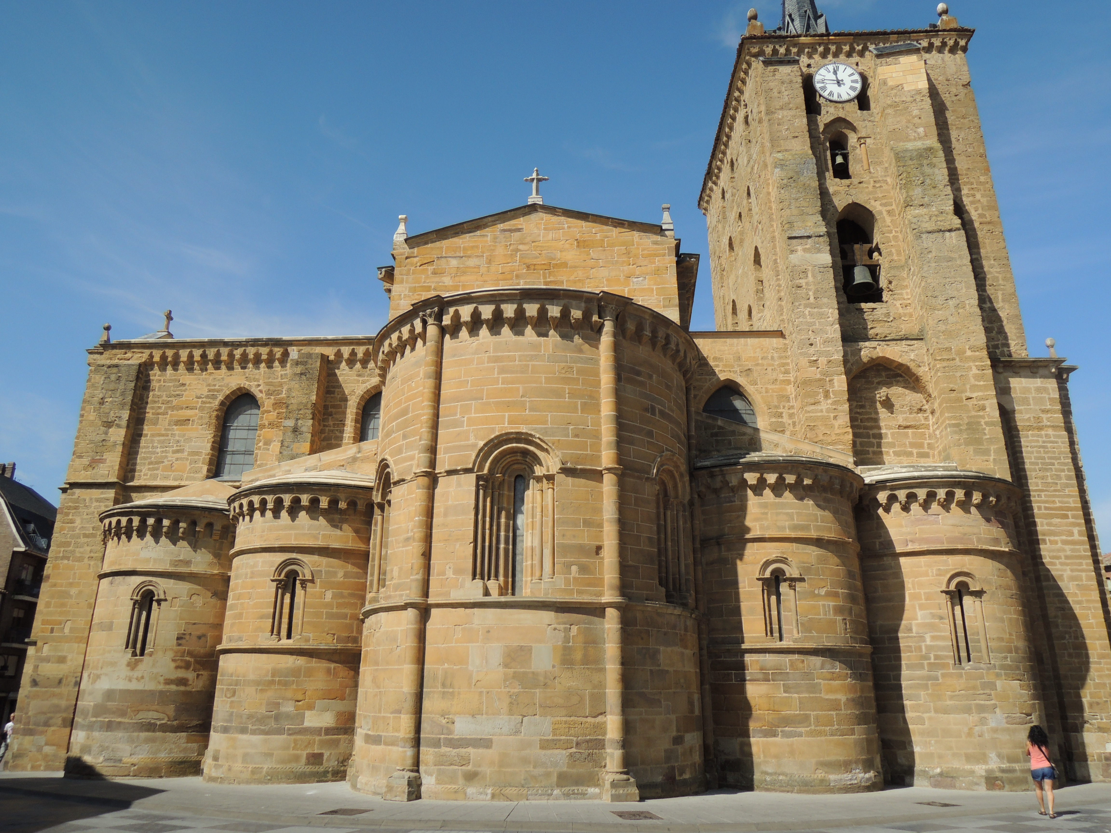 Iglesia deSanta María del Azogue de Benavente